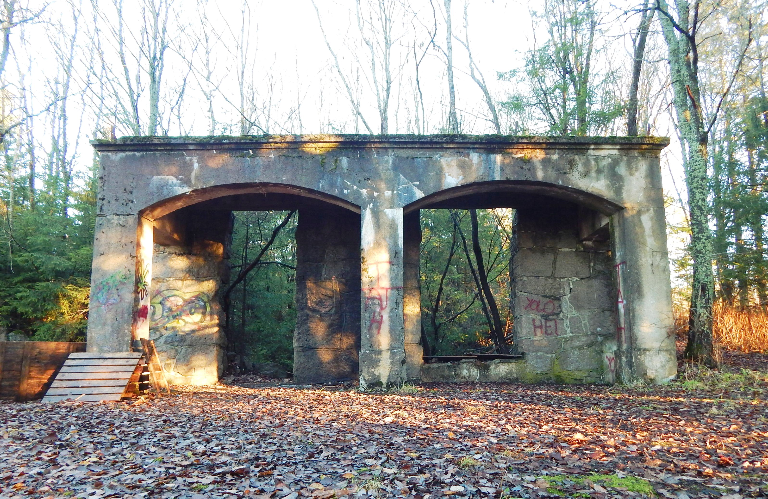 Ruinen av Anne Kures hotell i 2015